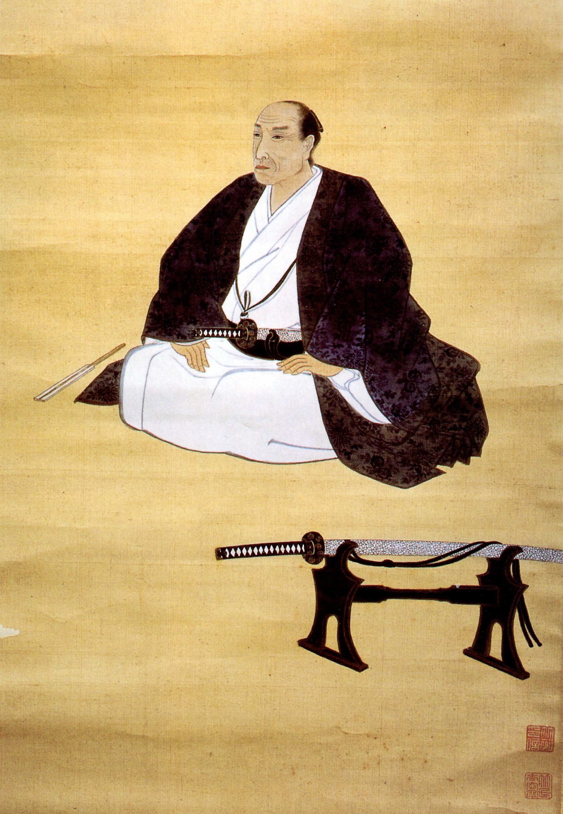 島津久統の肖像。